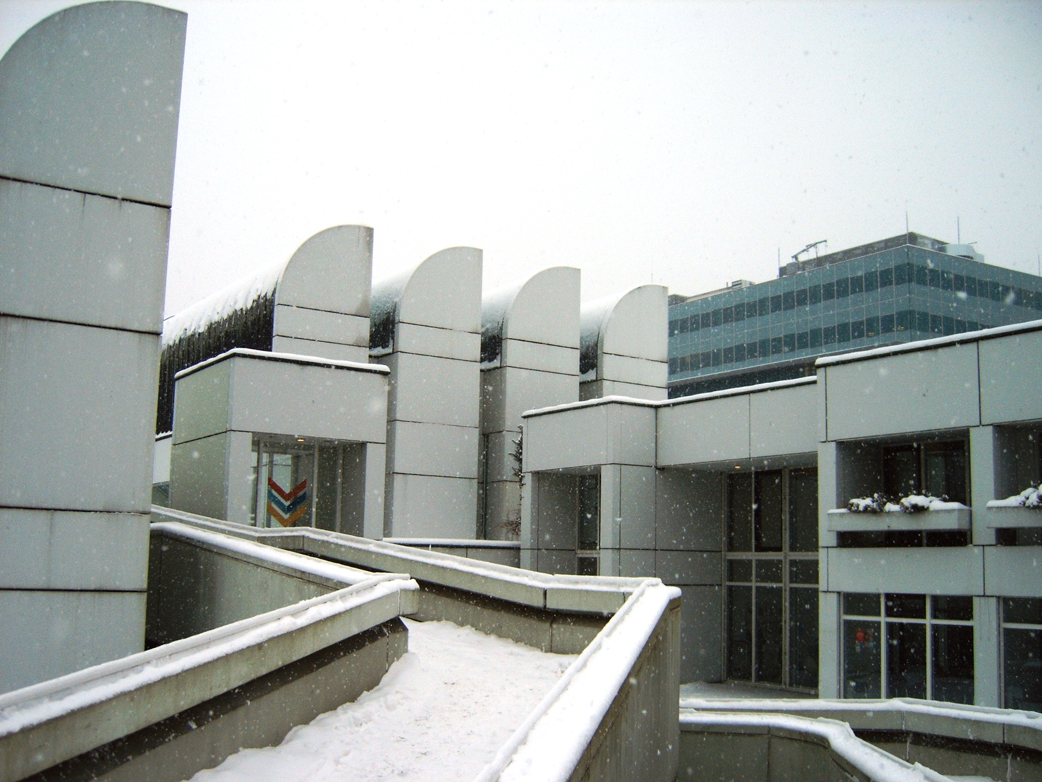 De ingang van het Bauhaus Archiv in Berlijn. Eigen werk.